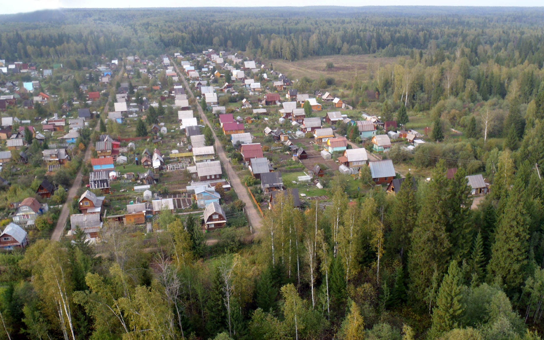 Наш дачный кооператив.